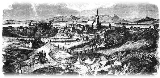 Képeslap a régi Marosvásárhelyről